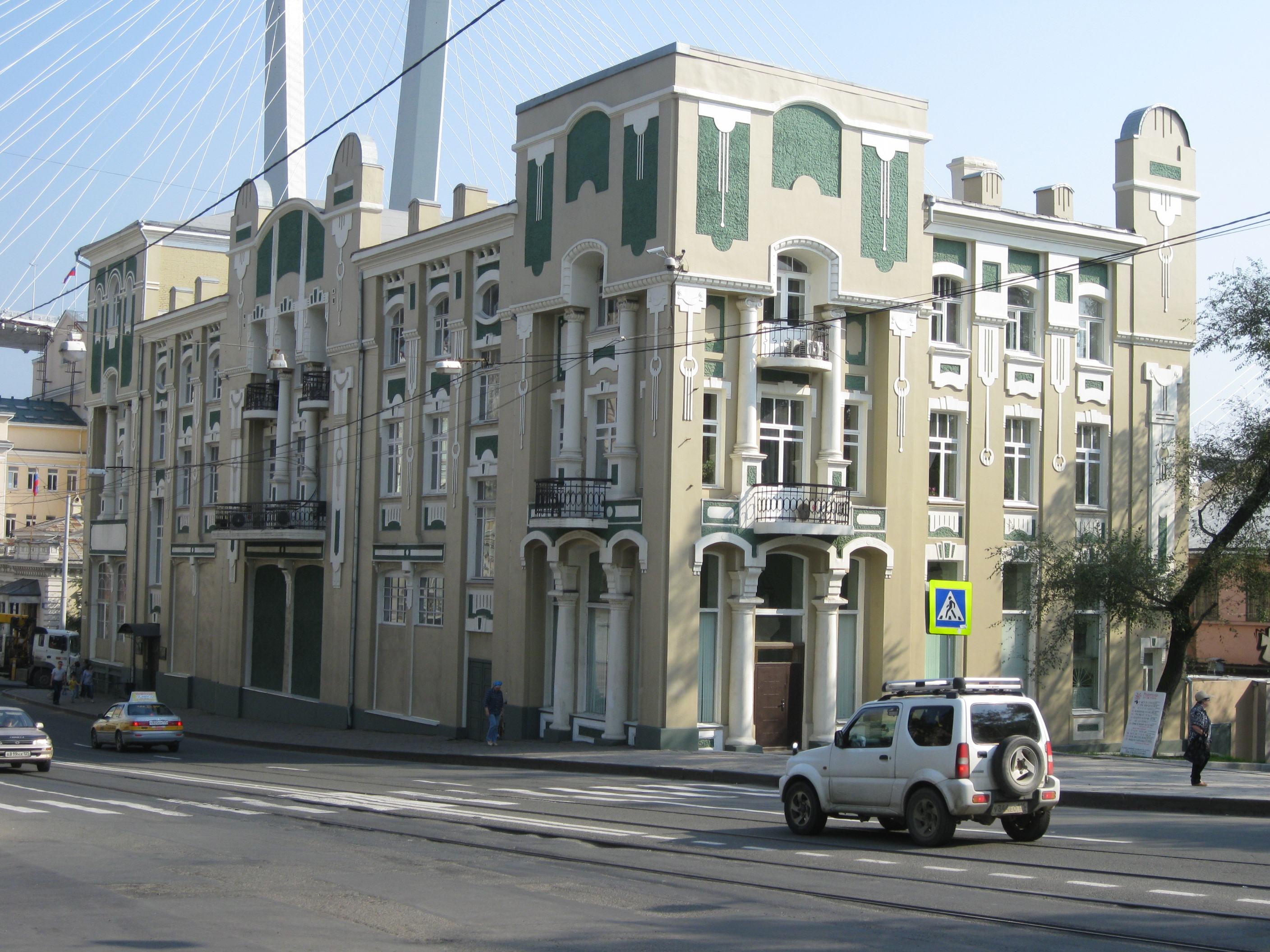 г. Владивосток, ул. Светланская, 50. Доходный дом Общества изучения Амурского края, за счет аренды которого предполагалось финансировать научную деятельность и музей общества.